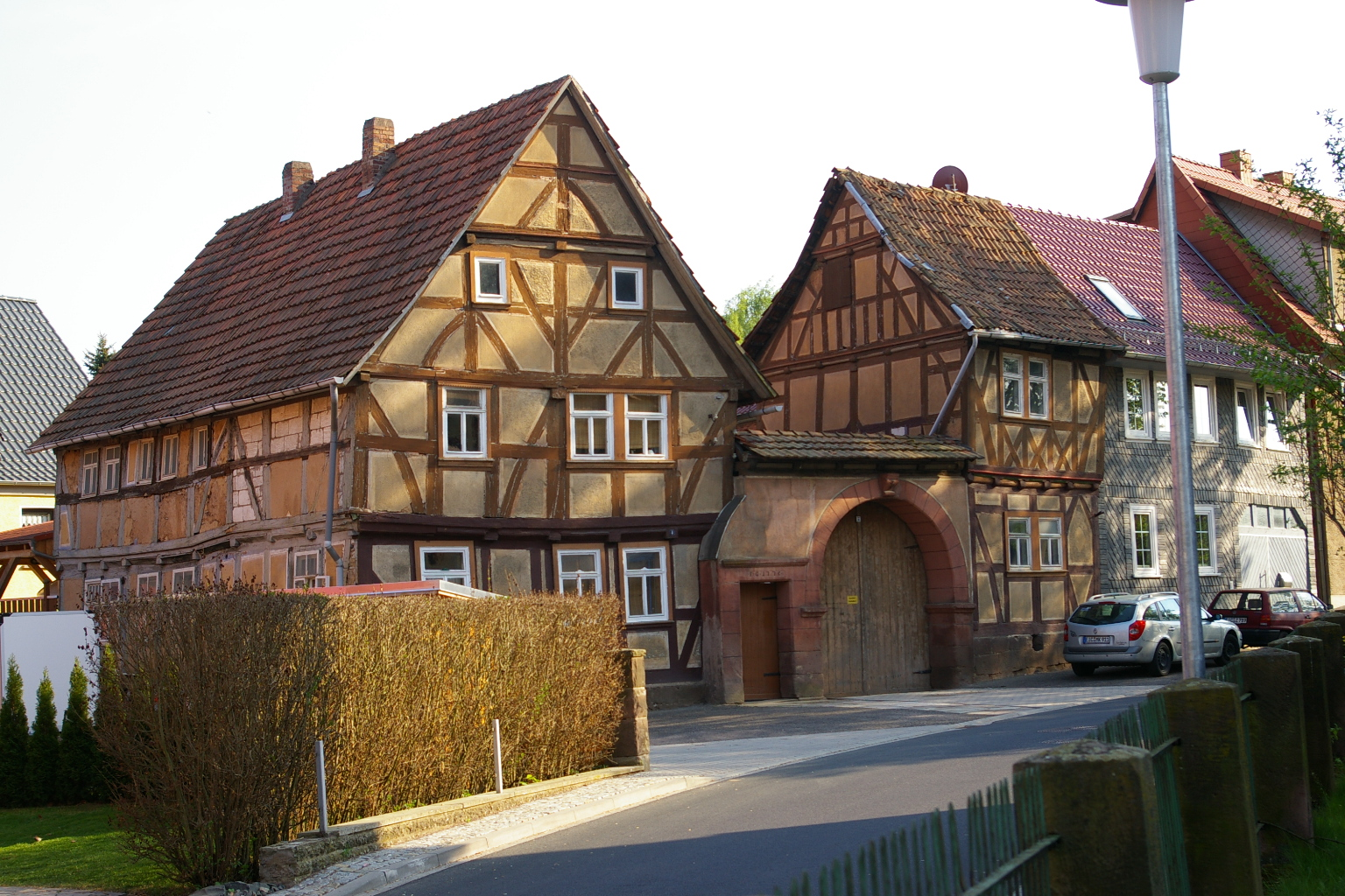 Knorrsches Haus in Uder, Landkreis Eichsfeld